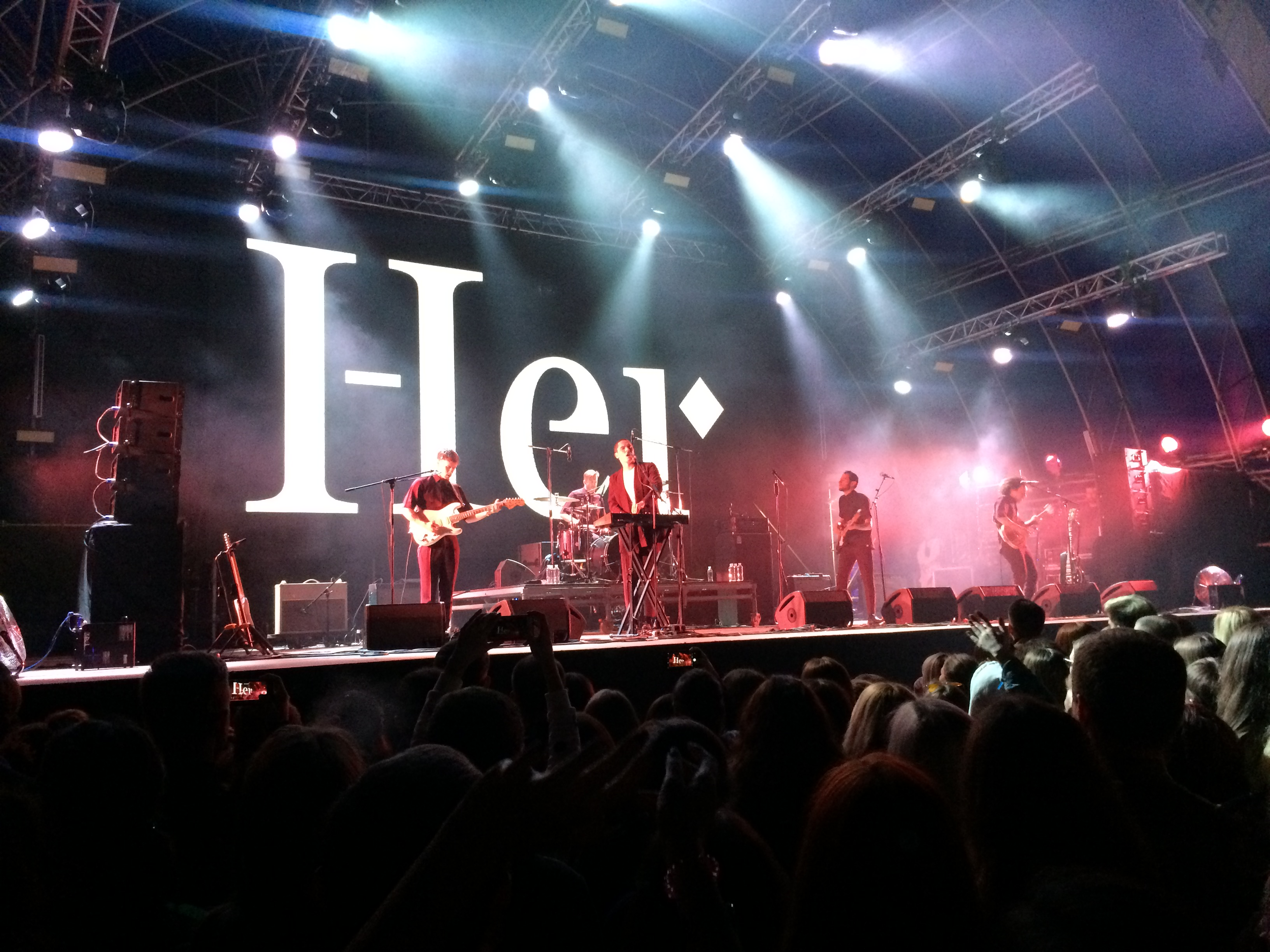 Фестиваль Atlas Weekend 2018. День перший.